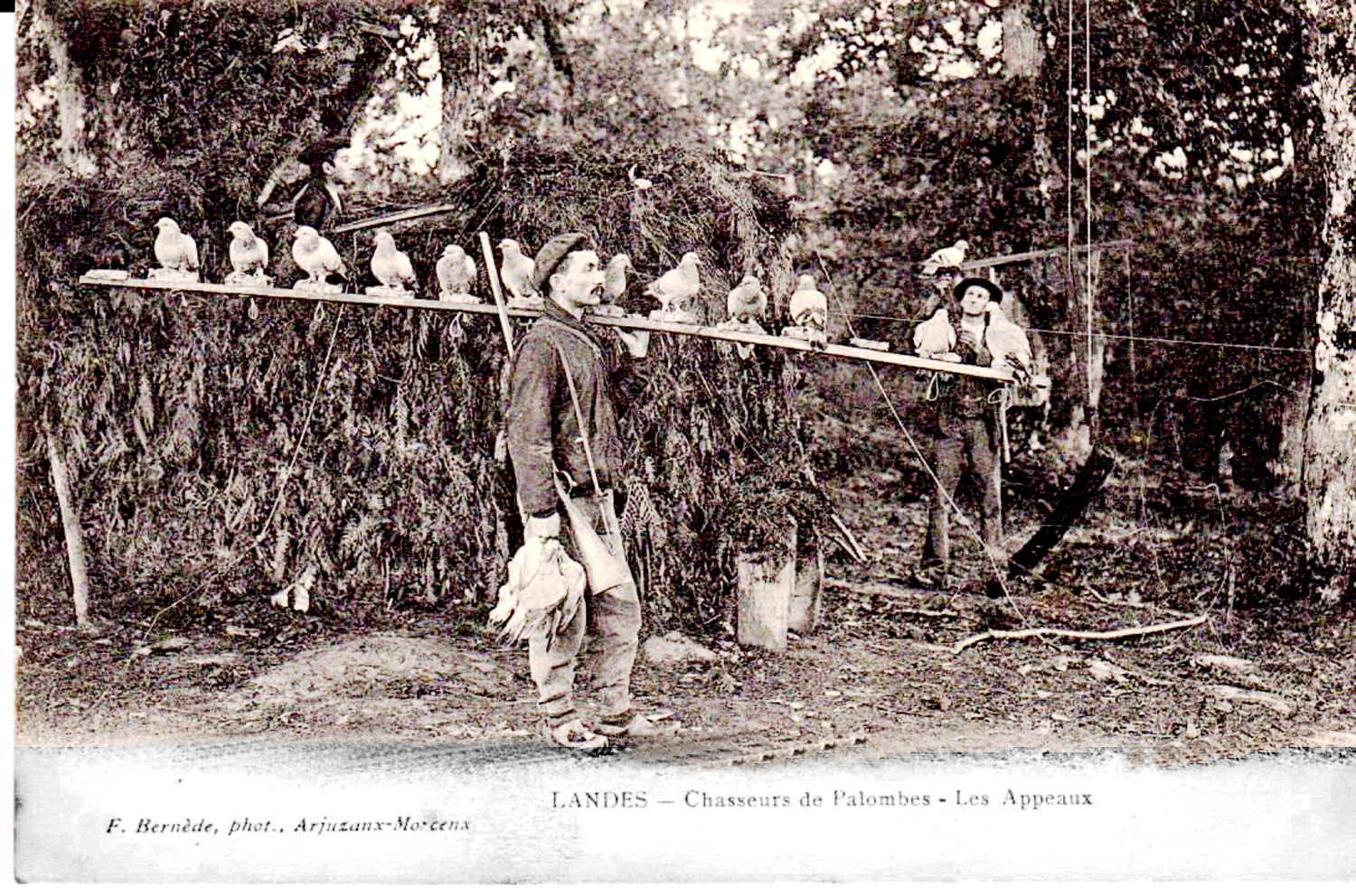 Chasseurs de palombes Les appeaux